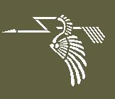 Godło 121 eskadry myśliwskiej wykonany na podstawie ilustracji z książki Jerzego Pawlaka "Polskie eskadry w Wojnie Obronnej 1939"